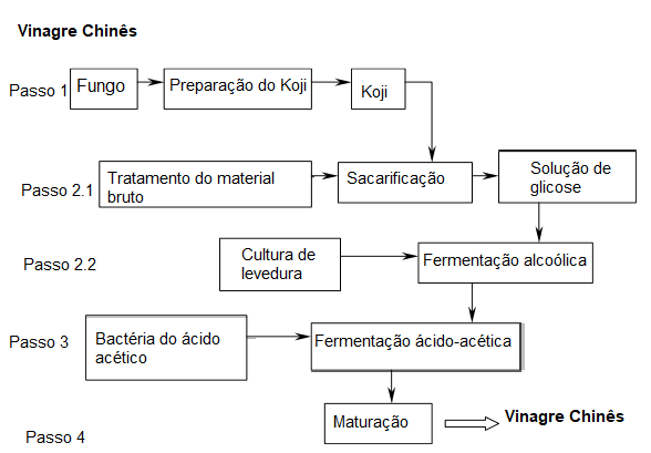 Processo geral de produção do vinagre chinês dividido em etapas essenciais.